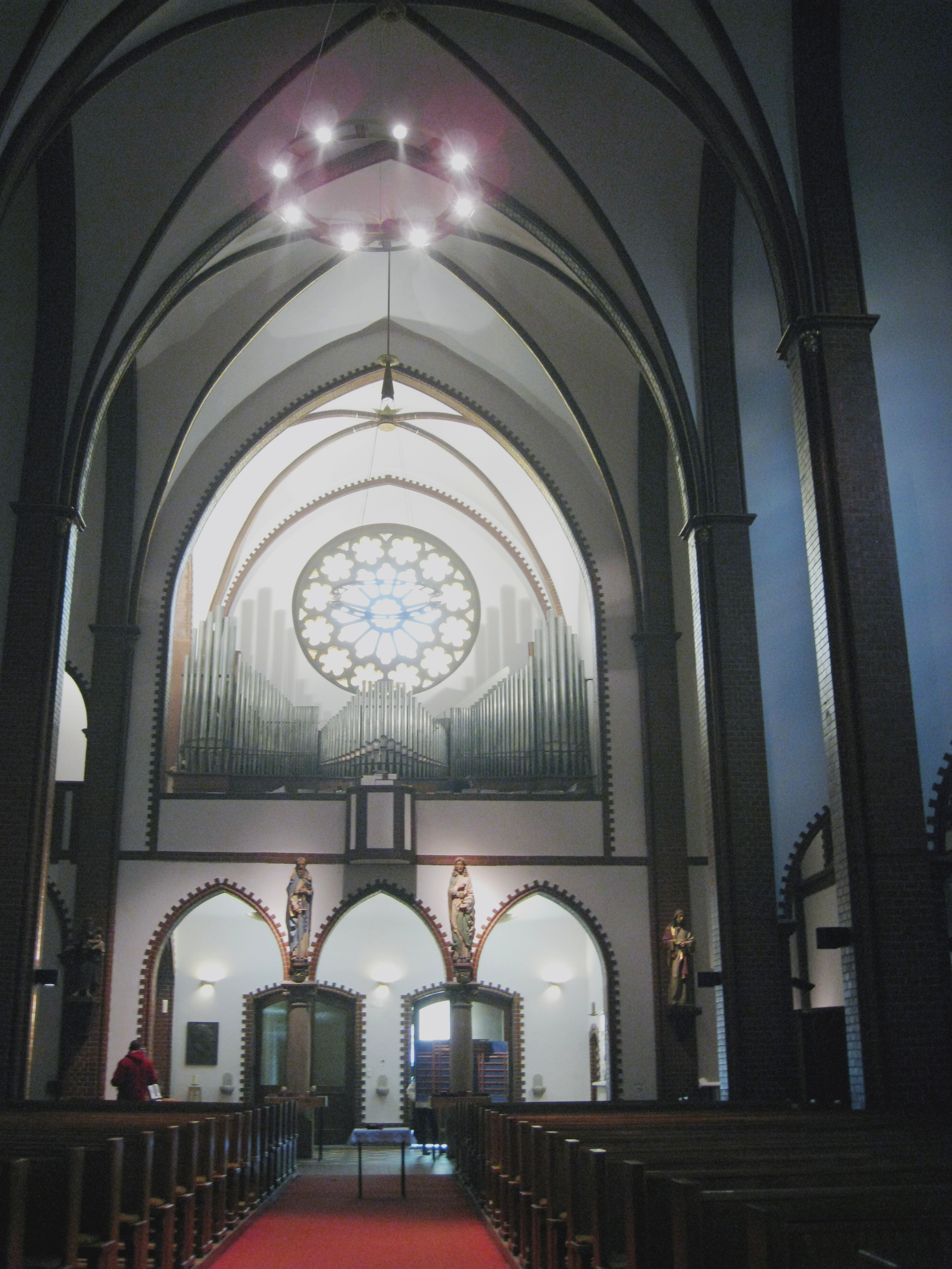 Orgelempore der St.-Petrus-Kirche zur Straße